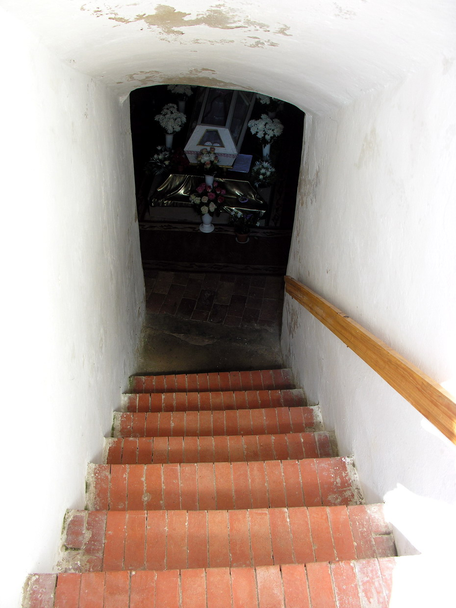 Žagarės regioninis parkas: Senosios Žagarės bažnyčia, Barboros Umiastauskaitės kripta